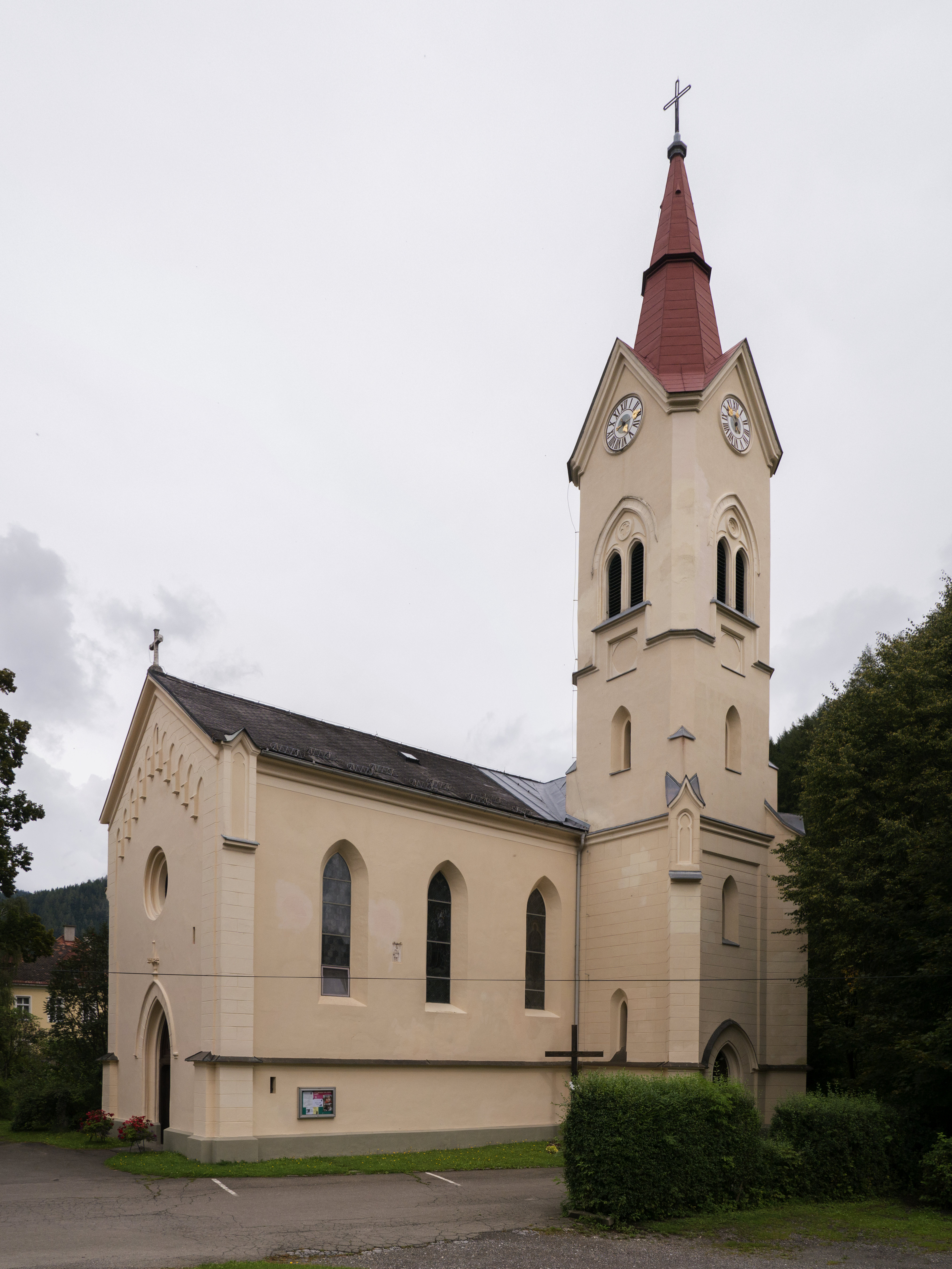 Kath. Pfarrkirche hl. Margaretha